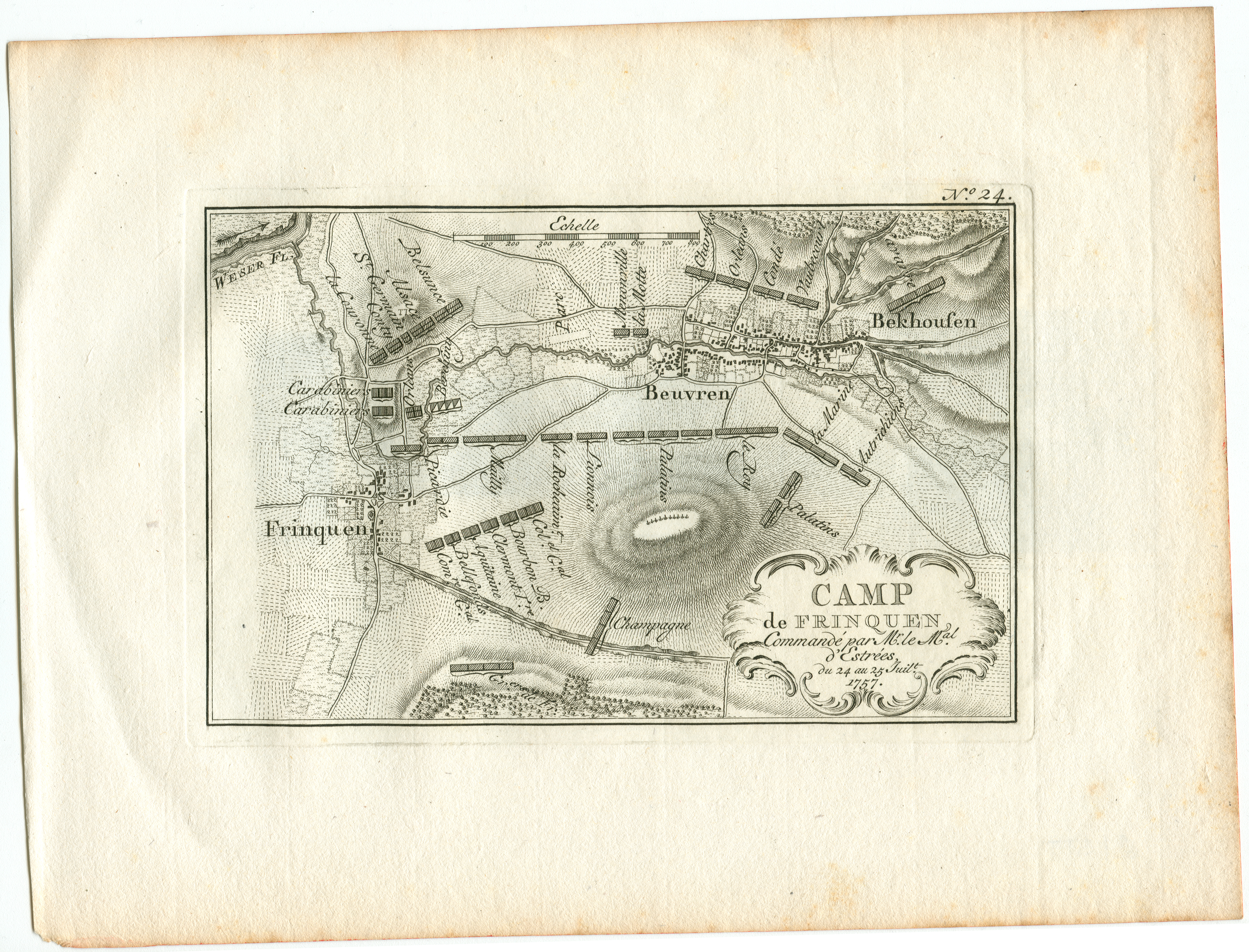 "Topographische Karten der Feldlager des Feldzuges von 1757 in Westfalen", hier: "Nr. 24", "Feldlager Frenke (in Niedersachsen, mit Börry und Bessinghausen) befehligt durch Seine Durchlaucht den Marschall von Estrées"; Kupferstich von Jacobus van der Schley